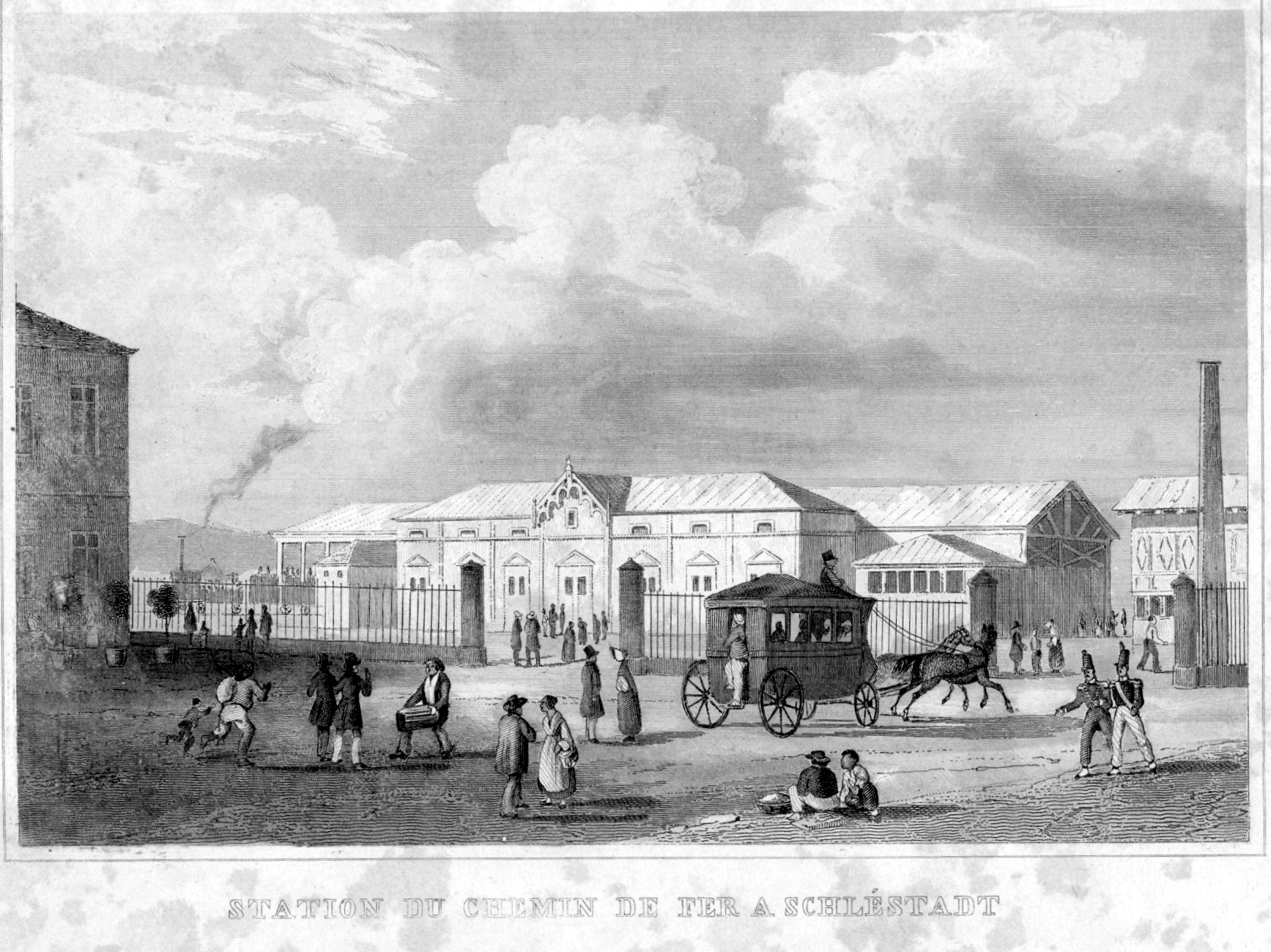 gravure